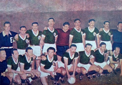 Jugadores de River y Boca, con traje de Palmeiras, en amistoso contra equipe de jugadores de Corinthians, São Paulo y Palmeiras, que jugaran de blanco. Arriba: Yácono, Sosa, Marante, Diano, De Zorzi, Rossi, Ramos, Minella. Abajo: Ricagni, Boyé, Muñoz, Moreno, Di Stéfano, Labruna, Pin.